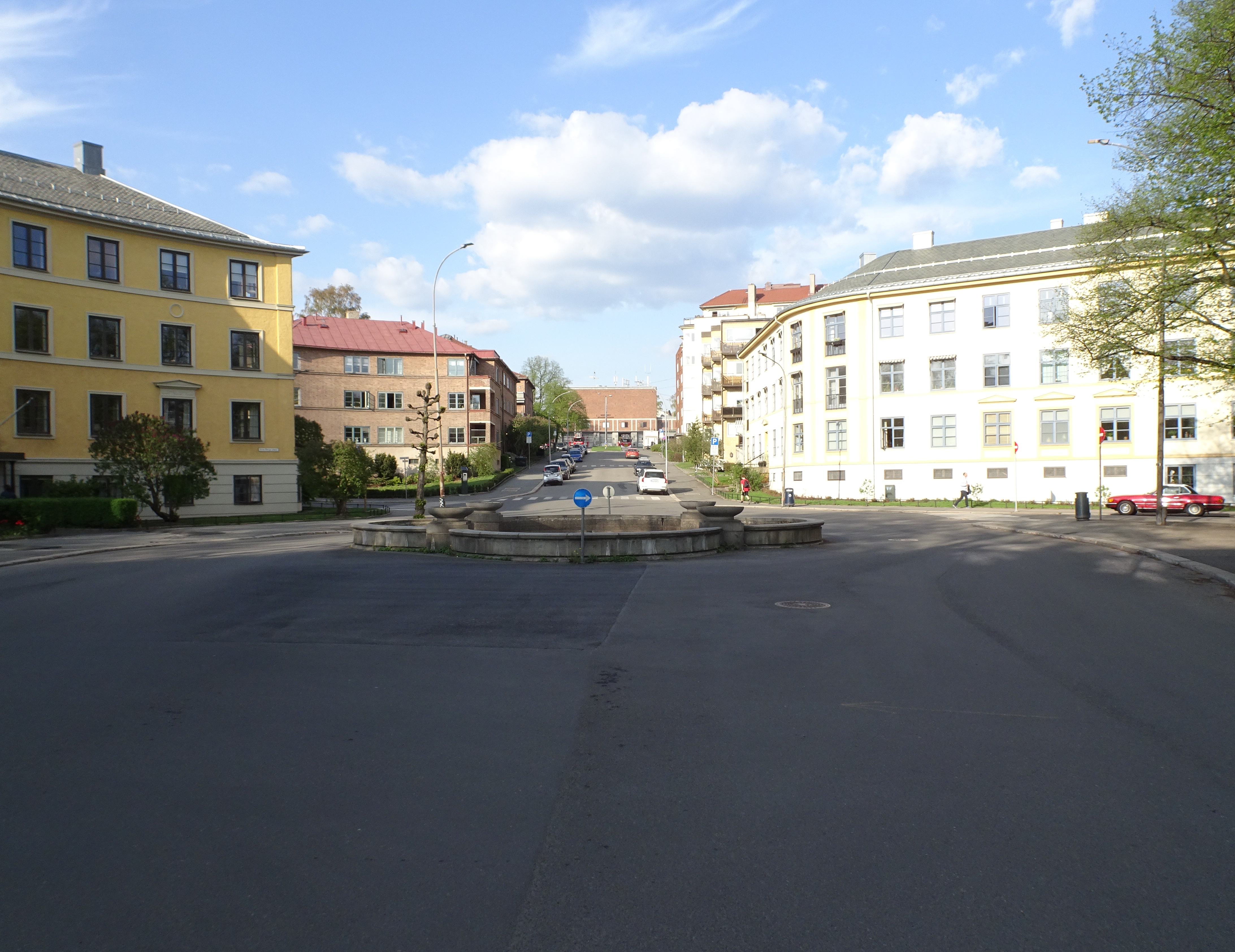 Løvenskiolds gate nordøstover ved Arno Bergs plass